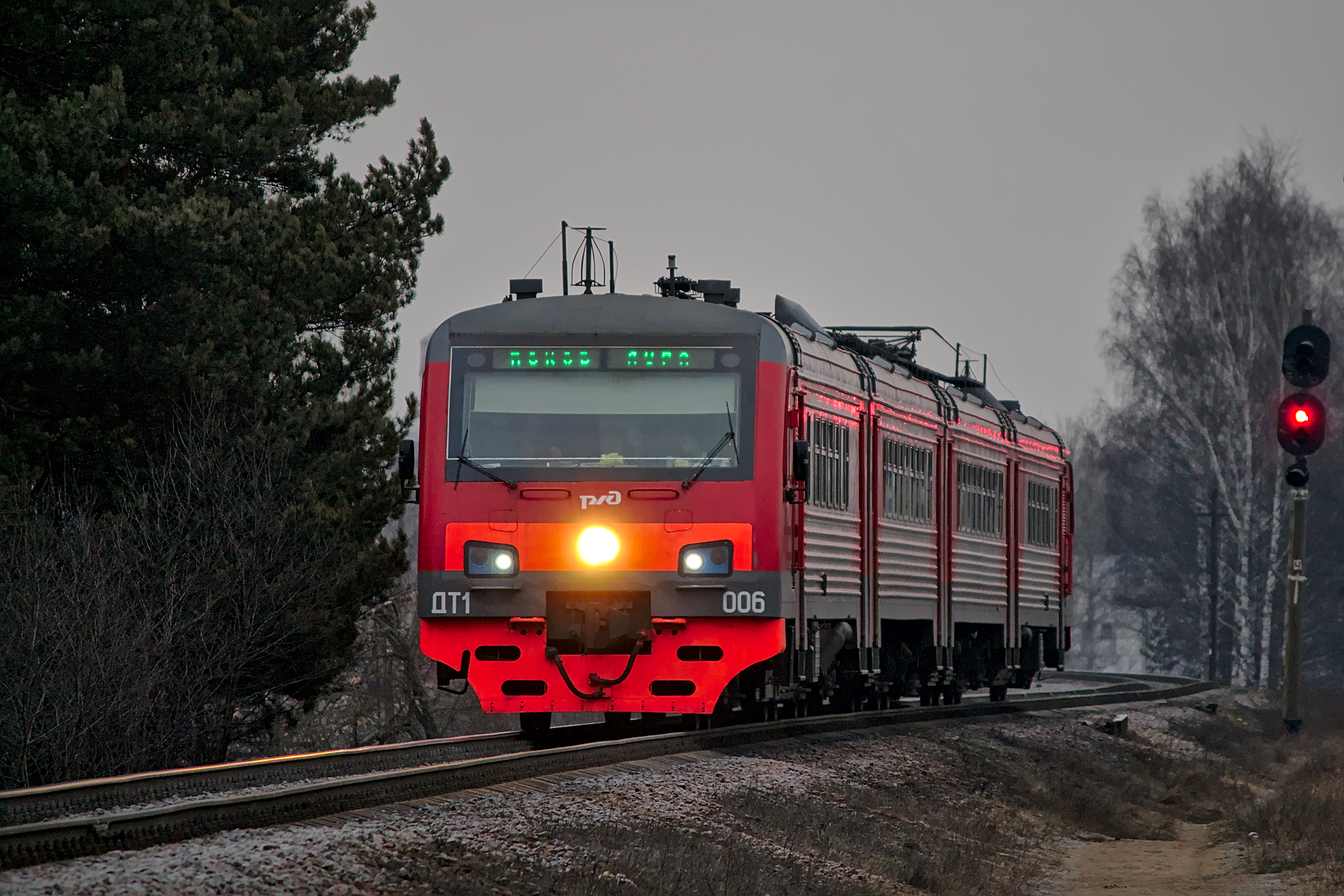 ДТ1-006, Луга-I - 144 км, маршрут Луга - Псков. см. фото 583056 в альбоме автора